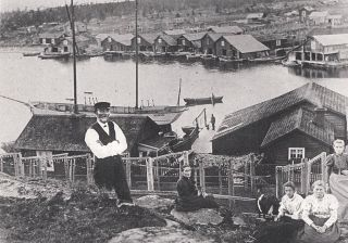 Die Fischersfamilie Grellson auf Trysunda im Jahr 1895, Trysunda, Ångermanland, Schweden.